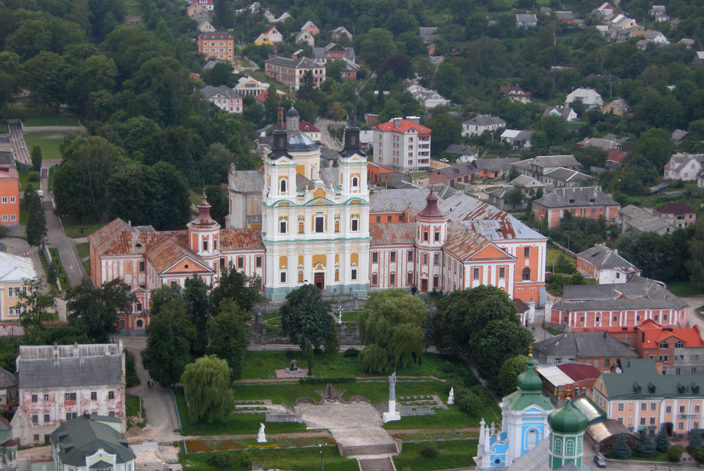 Крем'янець. Вигляд ансамблю Єзуїтського колегіуму з гори Бона.